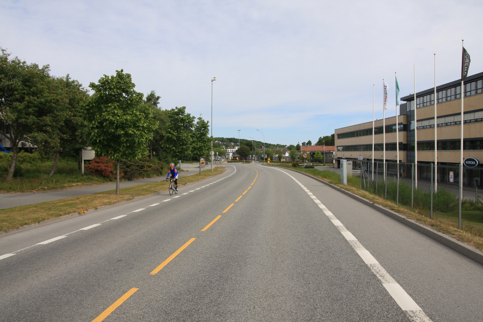 Fylkesvei 314